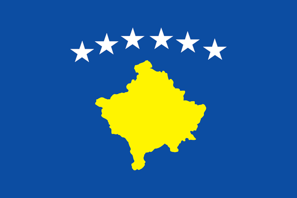 Flag of Kosovo